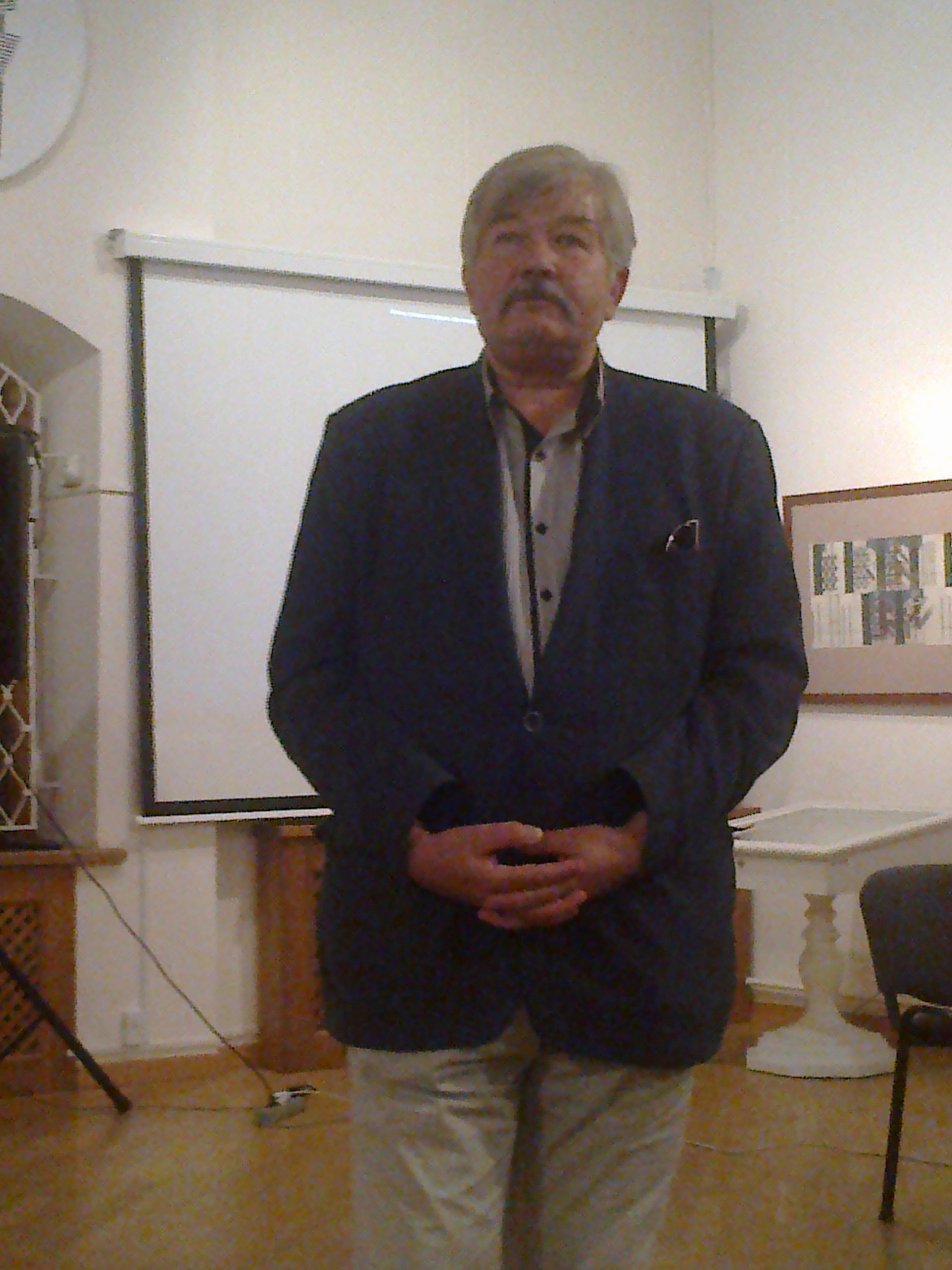 Сергій Іванюк під час лекції 1 жовтня 2015 року